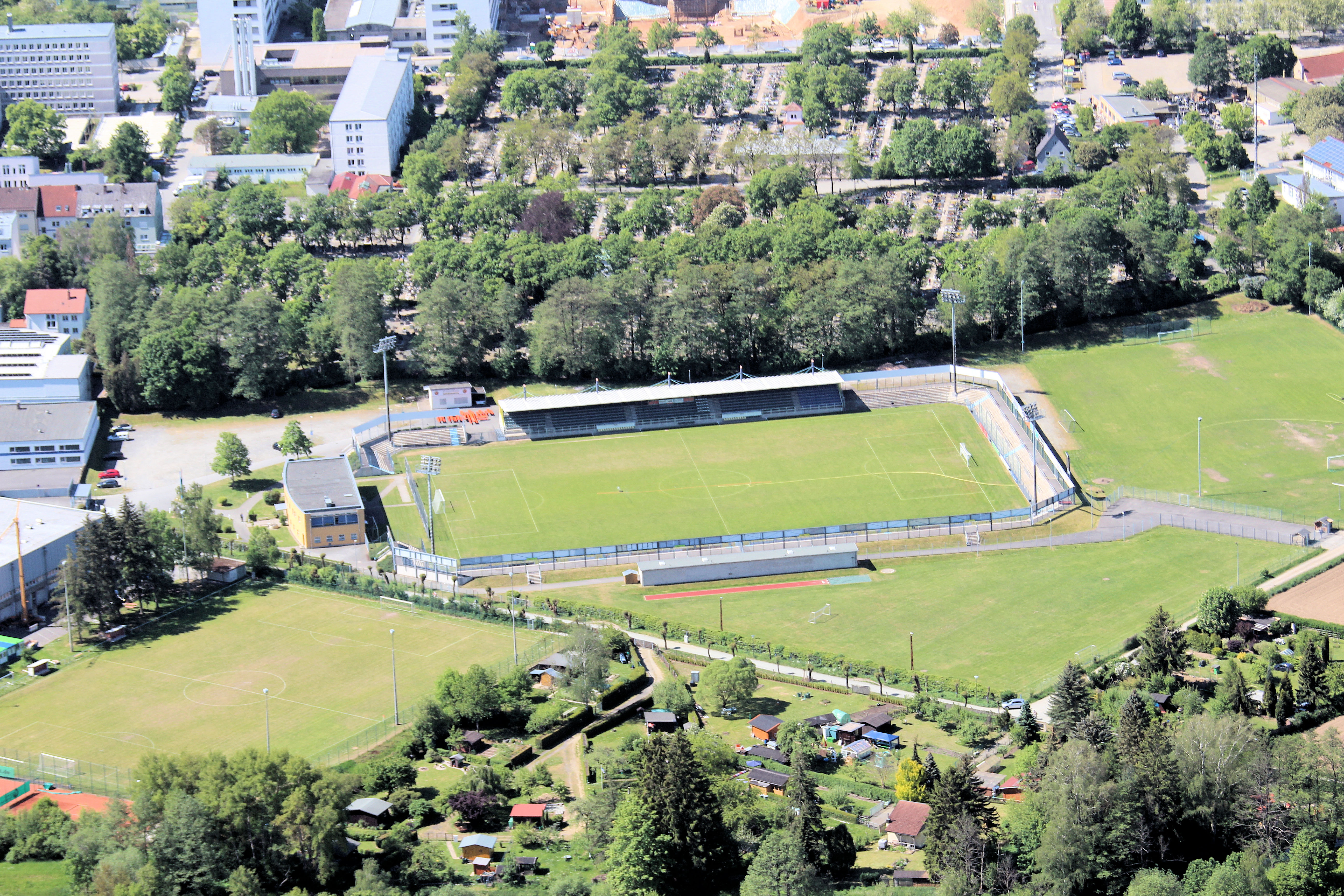 Weiden in der Oberpfalz, Bayern; Stadion am Wasserwerk